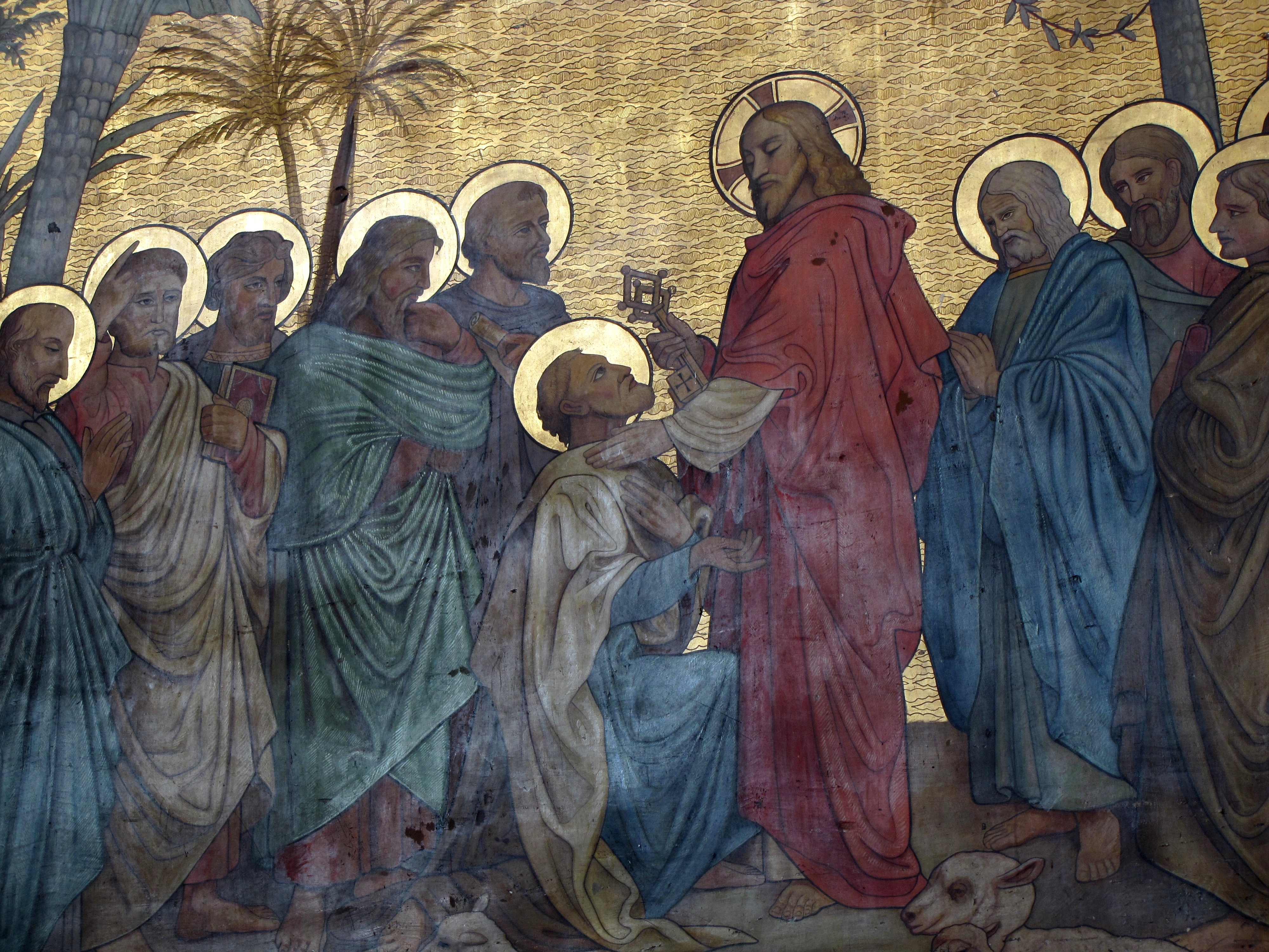 Alsace, Bas-Rhin, Église Saint-Étienne de Dambach-la-Ville (IA00115185). Peinture murale "Remise des clés à St-Pierre" (Atelier DENEKEN, fresque, 350x320, vers 1864)